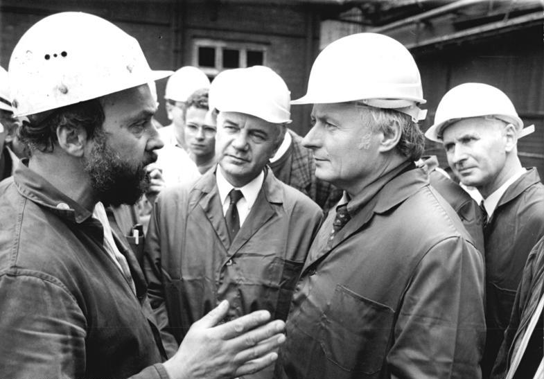 Brandenburg, Oskar Lafontaine, Werksbesuch ADN Thomas Lehmann 18 19.9.90 Brandenburg: Der saarländische Ministerpräsident und Spitzenkandidat der SPD, Oskar Lafontaine, der sich auf einer Tour durch das Land Brandenburg befindet, besuchte das Stahl- und Walzwerk Brandenburg. Bei einem Rundgang im Siemens-Kartin-Werk informierte er sich über die Situation der 7.400 Beschäftigten der GmbH. Mit der Frage, ob die Erfahrungen des Industriestandortes Saar helfen können, wandte sich Siegfried Treudler (l.) - seit 30 Jahren im Stahlwerk beschäftigt und nun von Kurzarbeit betroffen - an Oskar Lafontaine. Abgebildete Personen: Lafontaine, Oskar: Ministerpräsident des Saarlandes, Vorsitzender der SPD, Bundesrepublik Deutschland (GND 118855085)